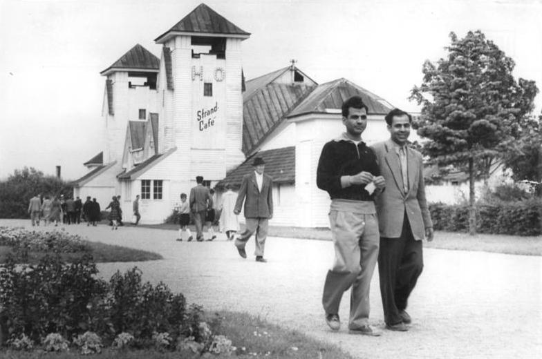 Zentralbild Biscan 30.7.1956 Internationaler Urlauber-Treff Ostseebad Heringsdorf Als Gäste der Gewerkschaften des Freien Deutschen Gewerkschaft-Bundes (FDGB), als Gäste der Regierung der Deutschen Demokratischen Republik oder als Gäste anderer Organisationen und Institutionen verbringen ausländische Freunde im Rahmen des Urlaubertausches ihre Ferien im Ostseebad Heringsdorf auf der Insel Usedom. Auch aus Westdeutschland und Westberlin sind Urlauber in den Ferienheimen. UBz: Rassan Khakpeer (links) aus Teheran im Iran, studiert an der Fachschule für Schwermaschinenbau in Leipzig. Dadallah Alischahi aus Abadan in Iran ist Chemiestudent an der Leipziger Karl-Marx-Universität. Bei einem kleinen Bummel durch die gepflegten Parkanlagen von Heringsdorf, wo beide ihre Semesterferien verleben, fand sie der Reporter.